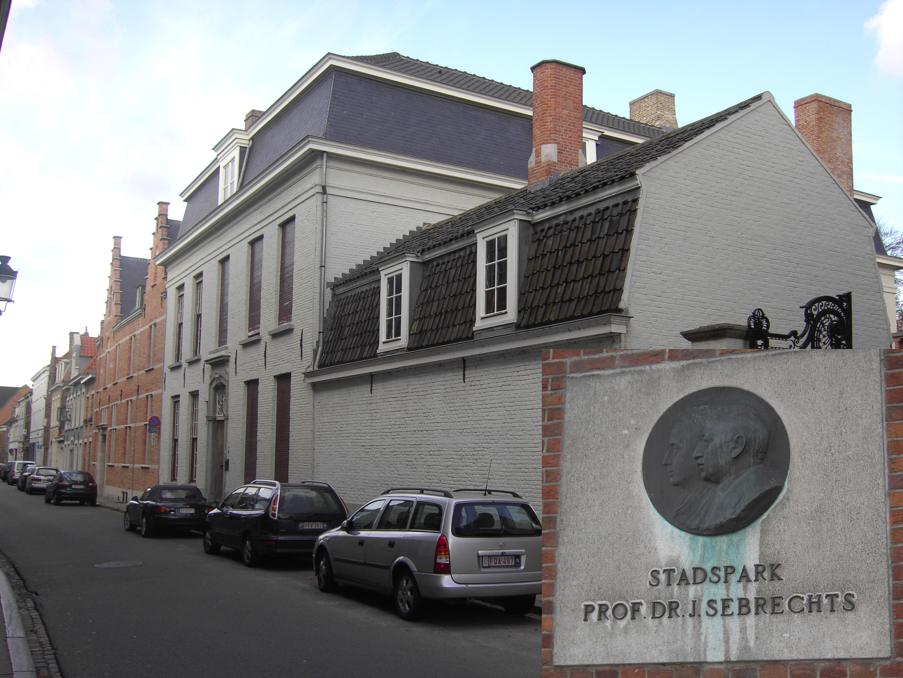 Woning van dokter Joseph Sebrechts in de Beenhouwersstraat. De medaillon hangt in de Oude Zak - Brugge - West-Vlaanderen - Belgium